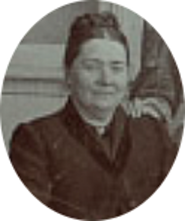 Helene von Manteuffel, geb. Brandstein